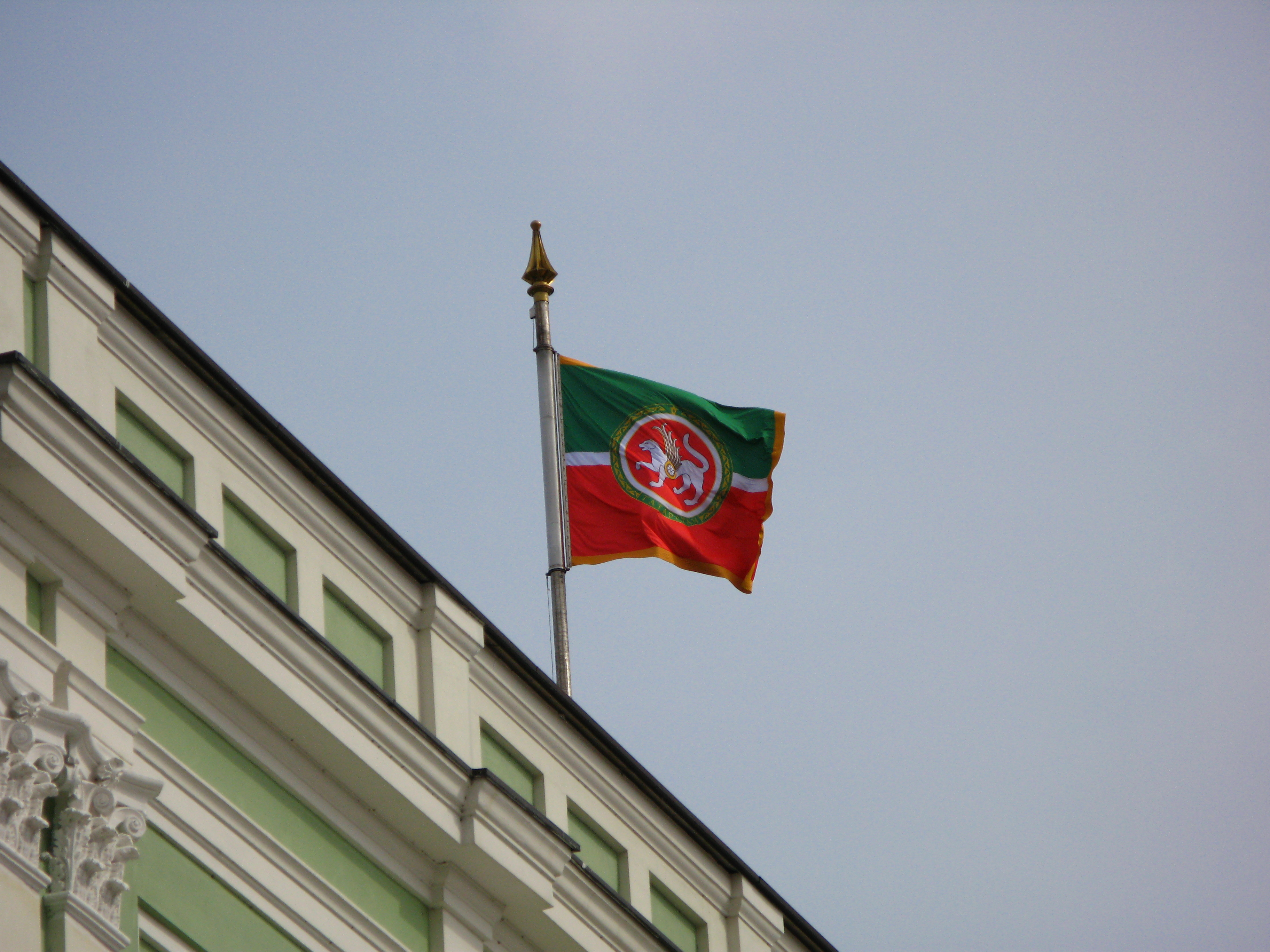 Zastava Tatarstana na parlamentu Tatarstana. Kazanj, Rusija.